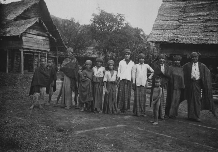 Foto. Groepsportret van Gajo bevolking in een dorp bij het meer van Takingeun